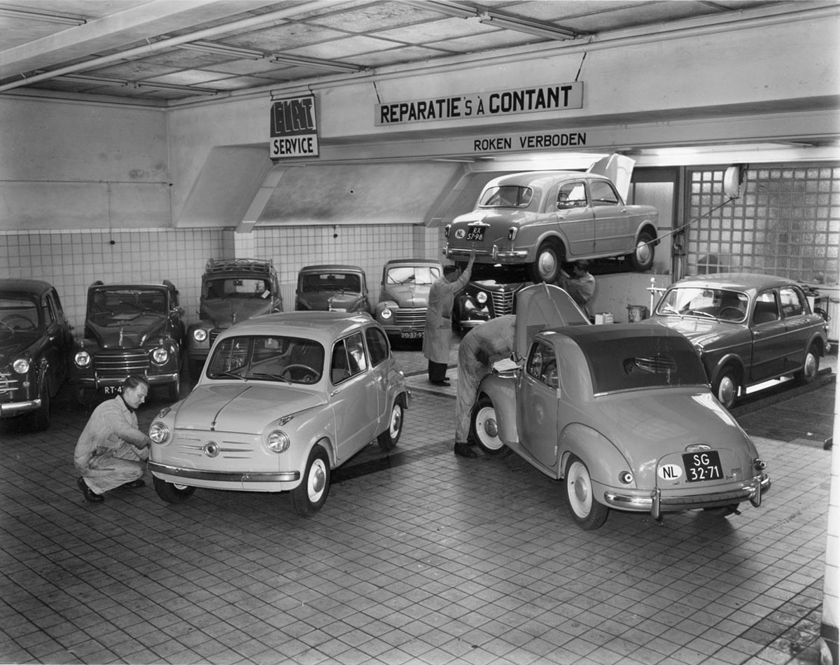 Fiat garagebedrijf in de Pijp, hoek Gerard Doustraat en Tweede Jacob van Campenstraat, Amsterdam, 3 mei 1955 Foto Ben van Meerendonk / AHF, collectie IISG, Amsterdam